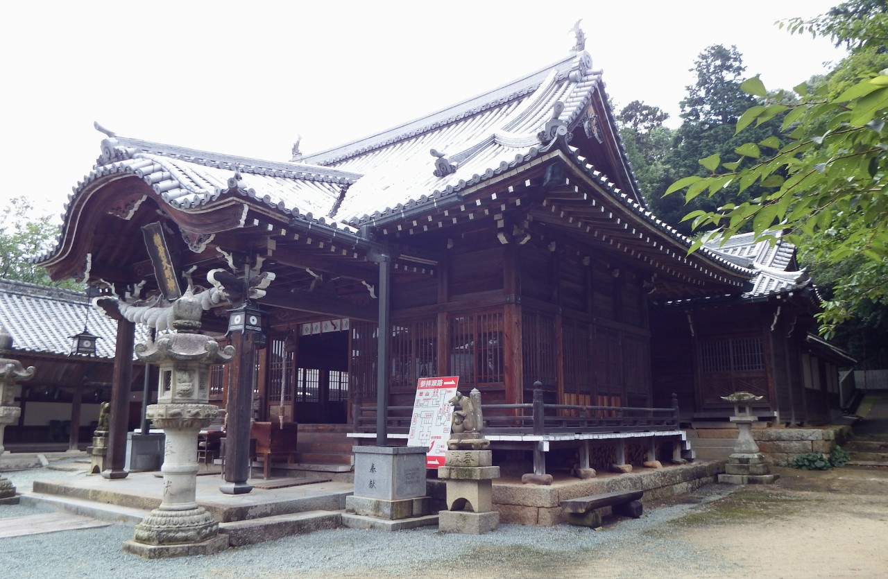 伊予稲荷神社の拝殿